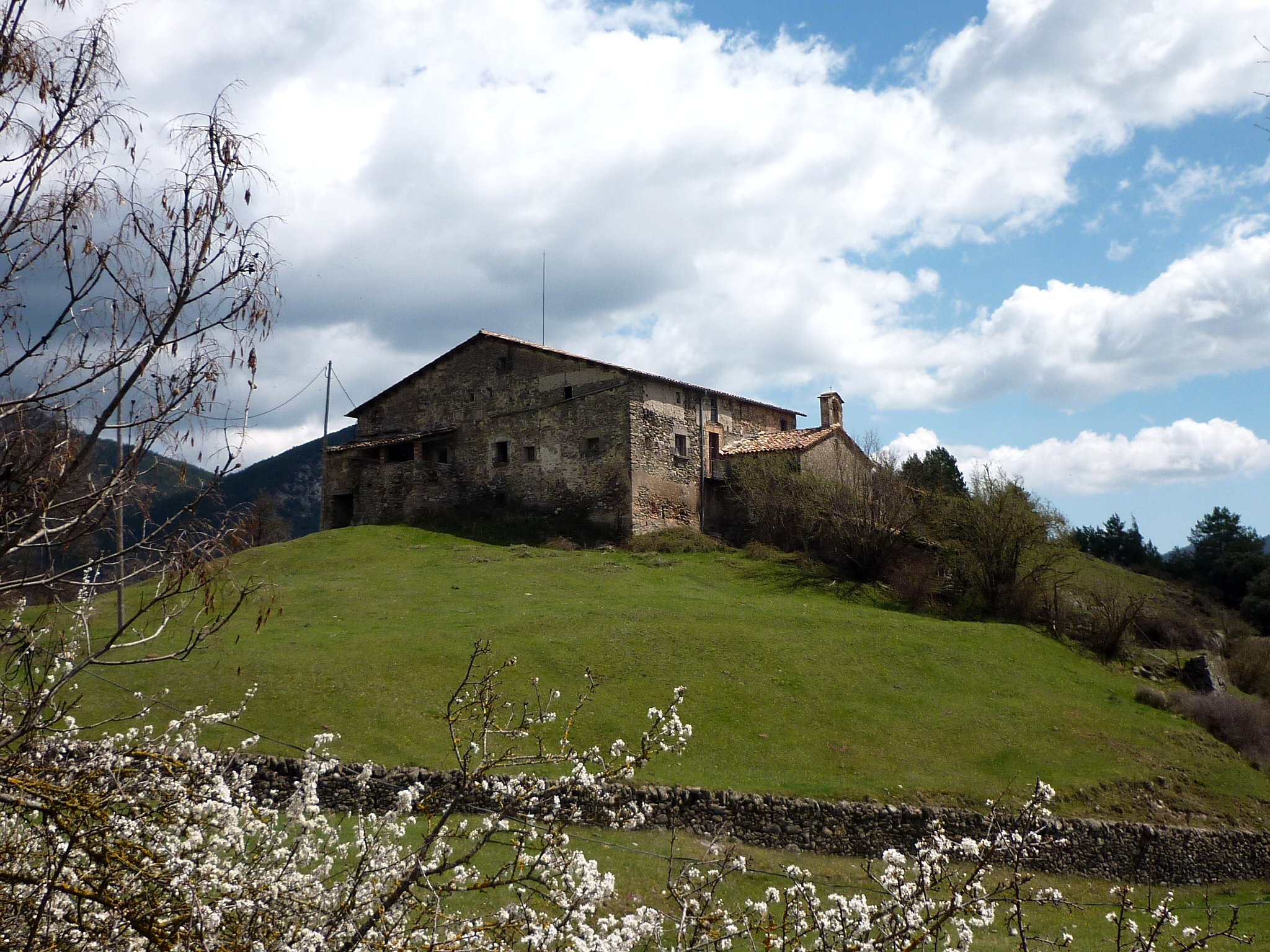 La masia del Bancell té adosada la capella de Sant Pere